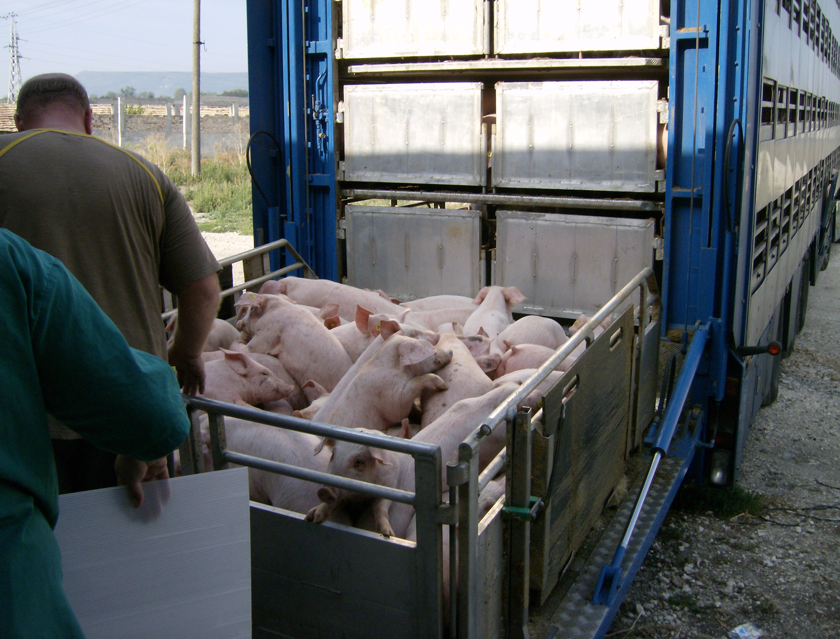 транспорт на живатни